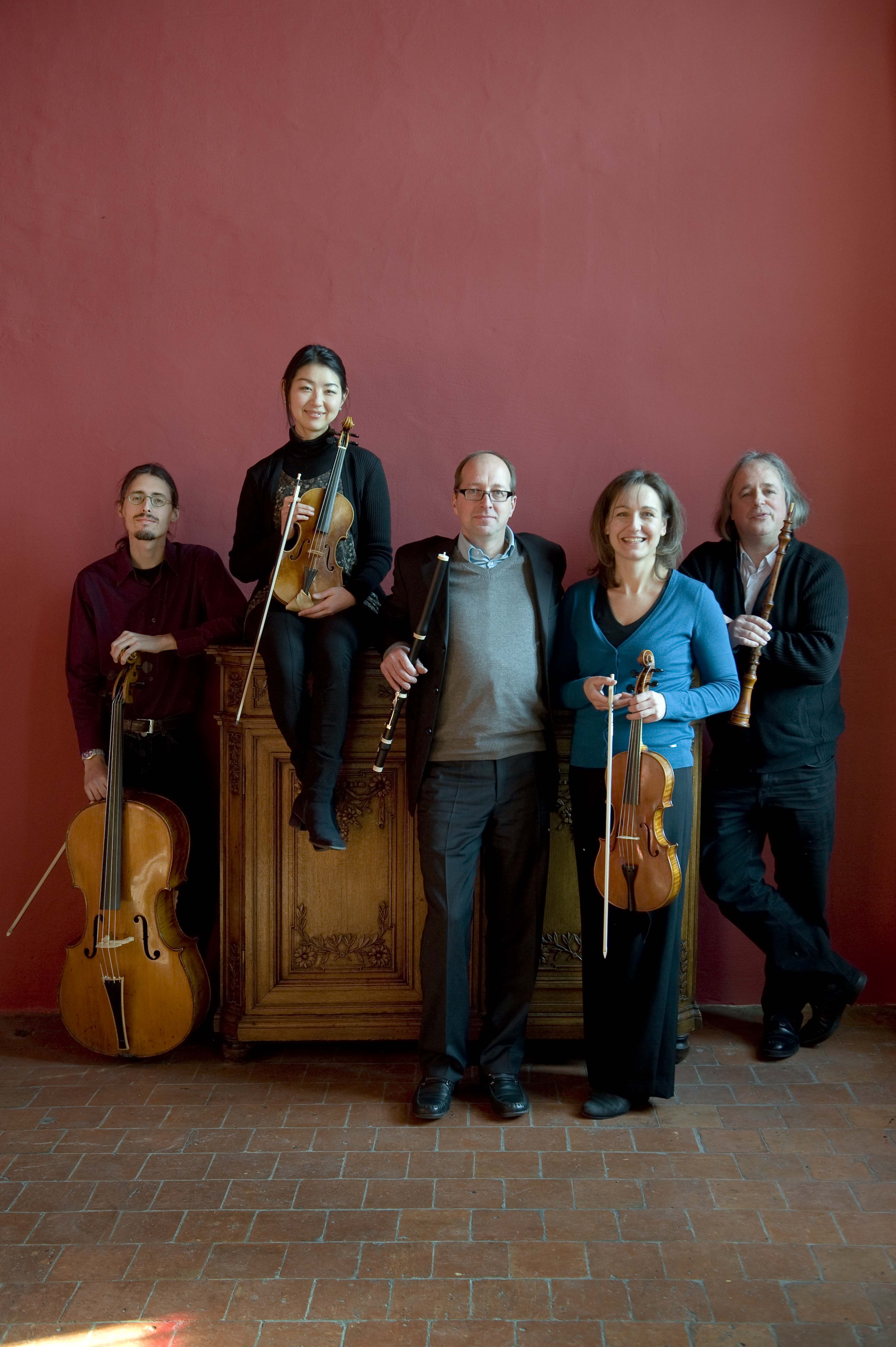 Il Gardellino, Vlaams Barokensemble.